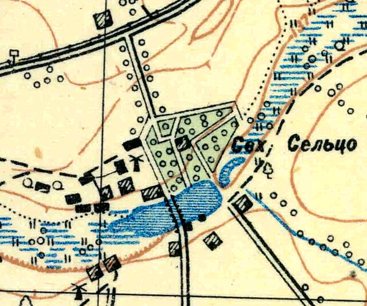 Топографическая карта Ленинградской области, квадрат О-35-24-А-а (Клясина), посёлок Сельцо